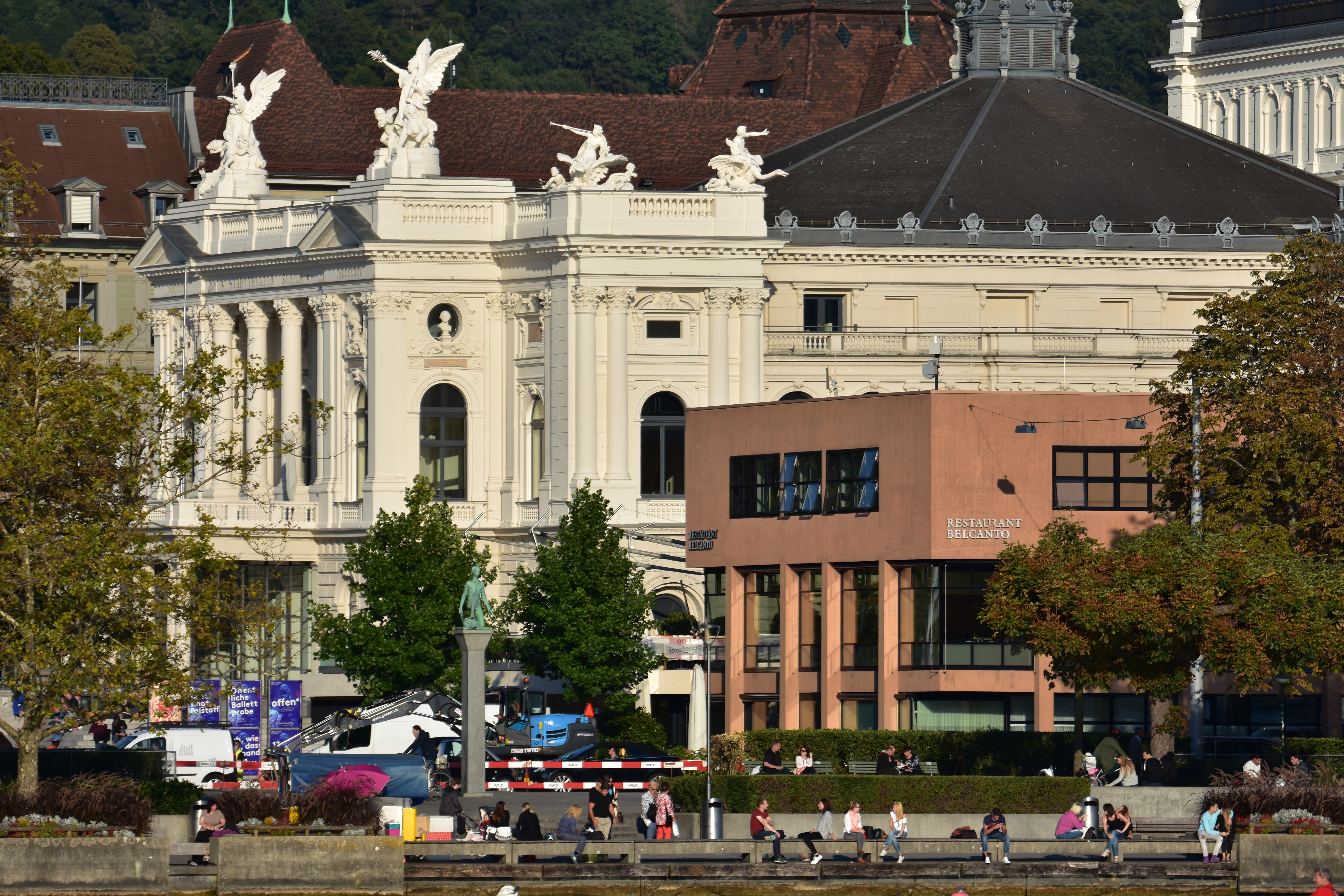 Utoquai, the Bernhard-Theater and the Opernhaus buildings in Zürich (Switzerland) as seen from Zürichsee-Schiffahrtsgesellschaft (ZSG) MS Helvetia on Zürichsee